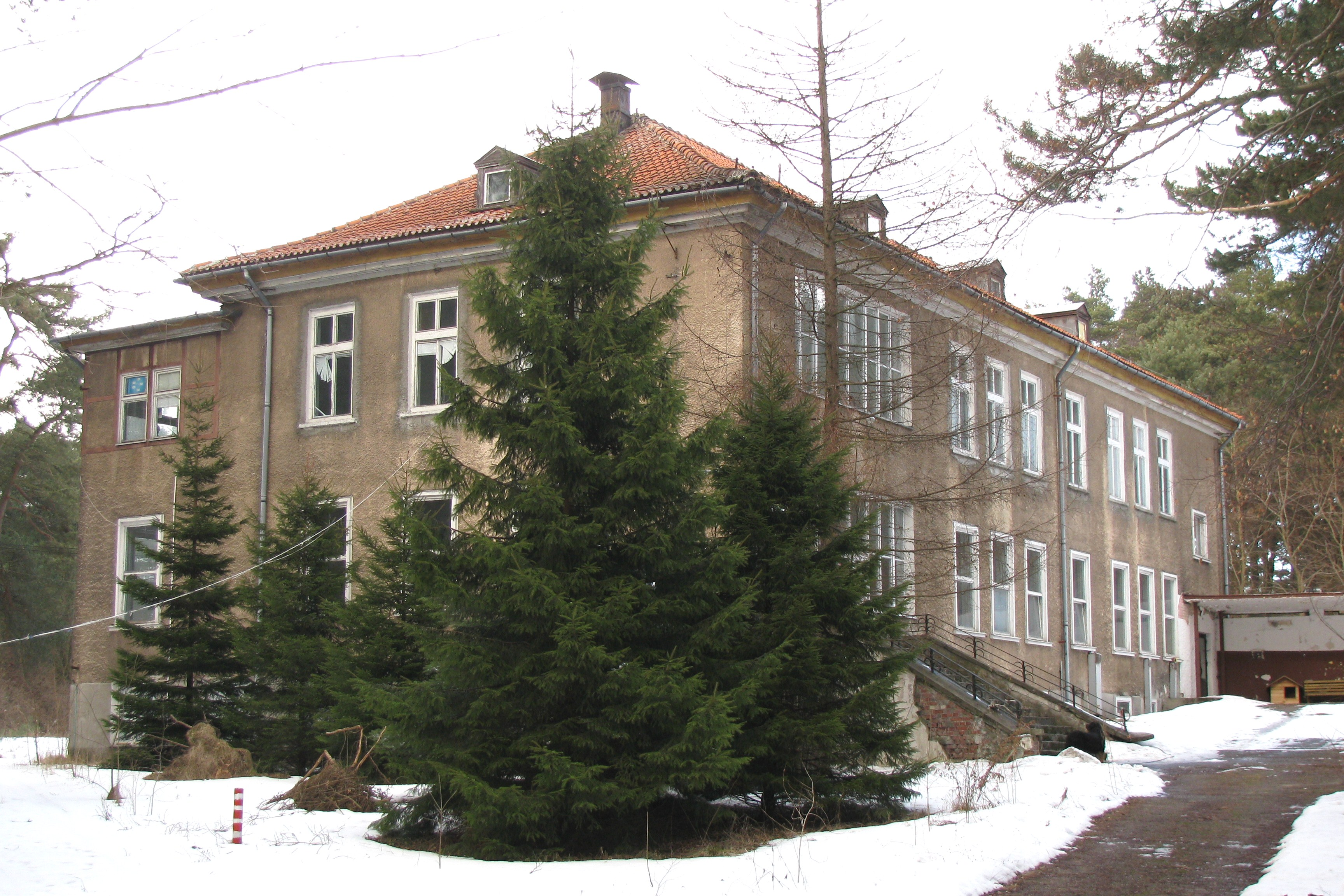 Front budynku pohitlerowskich koszarów niemieckich. Orle, koło Gdańska.